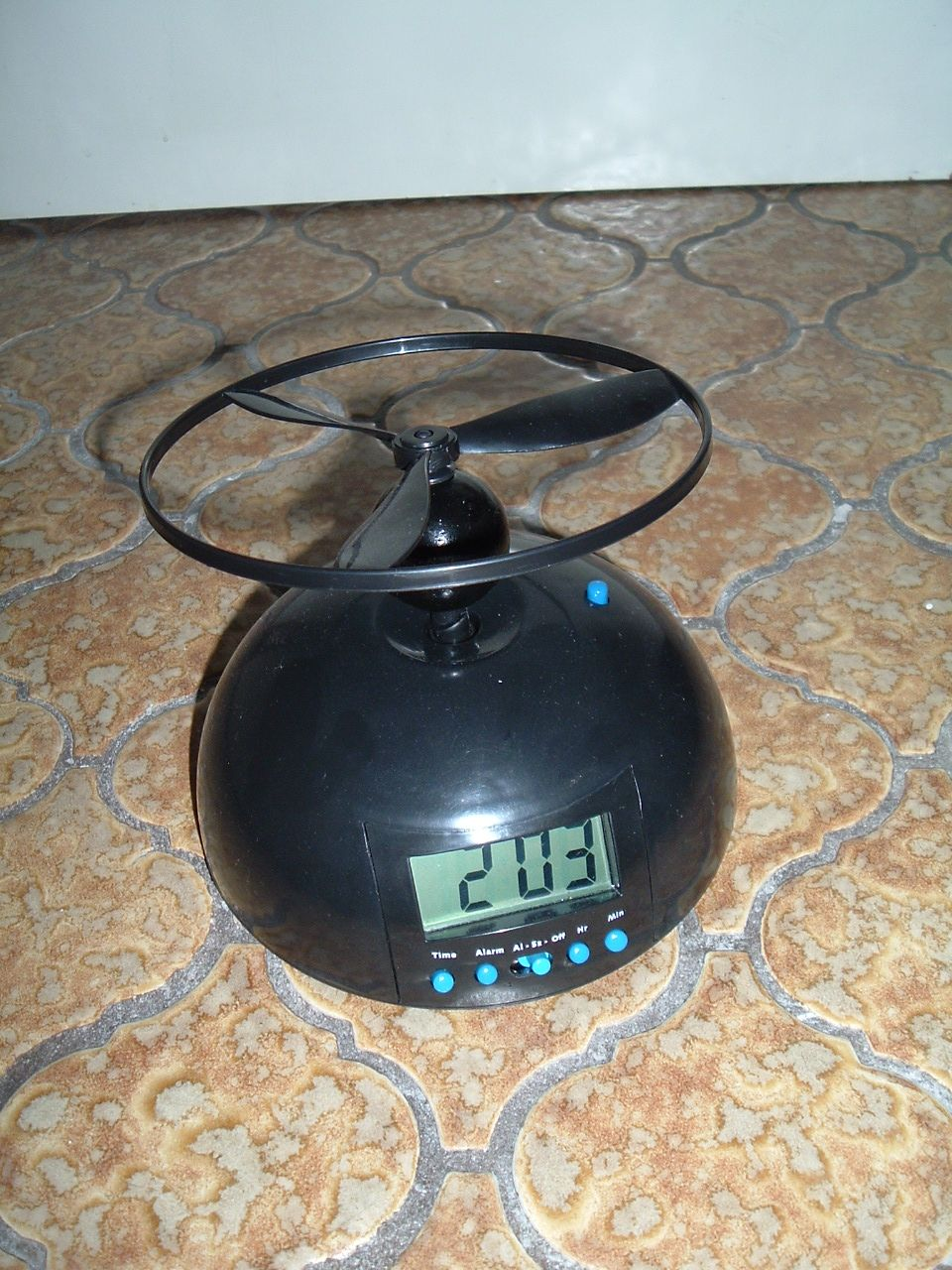 RotorWecker. Der Rotor hebt sich beim Wecken ab und der Wecker kann nur durch Aufstecken des Rotors ausgestellt werden. Höhe ca. 10 cm, Ø ca. 14 cm